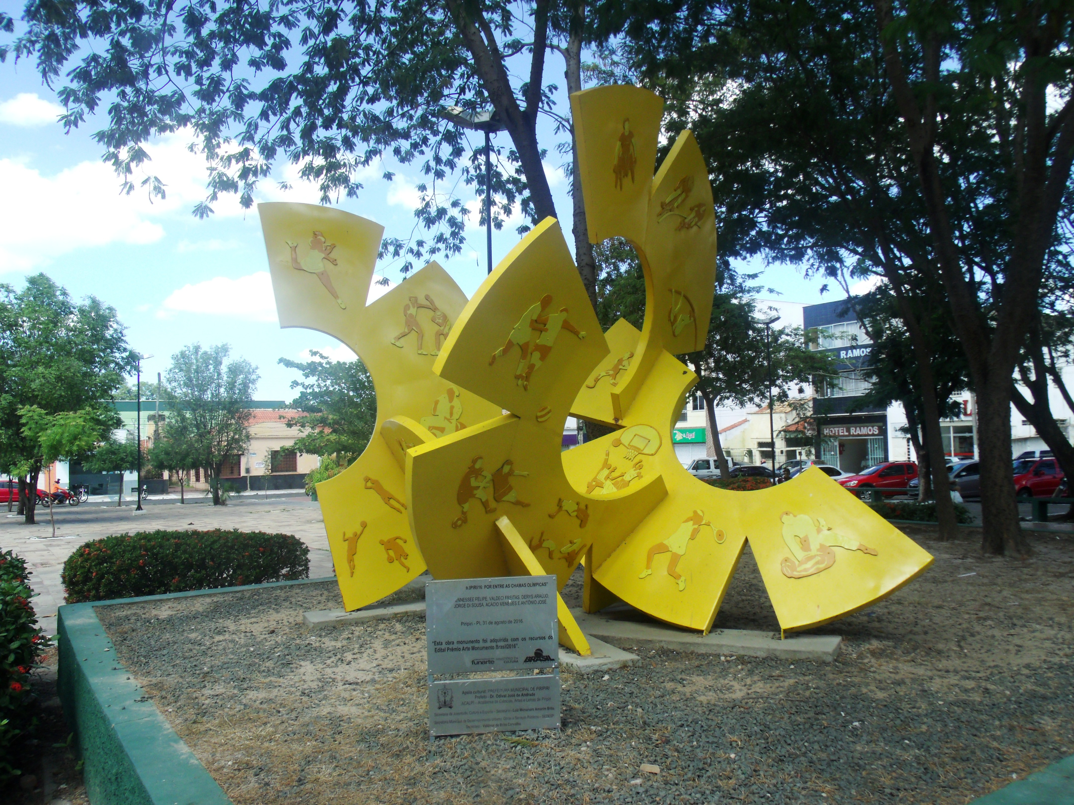 escultura com apoio da FUNARTE no nordeste do Brasil, em piripiri, no Piauí.